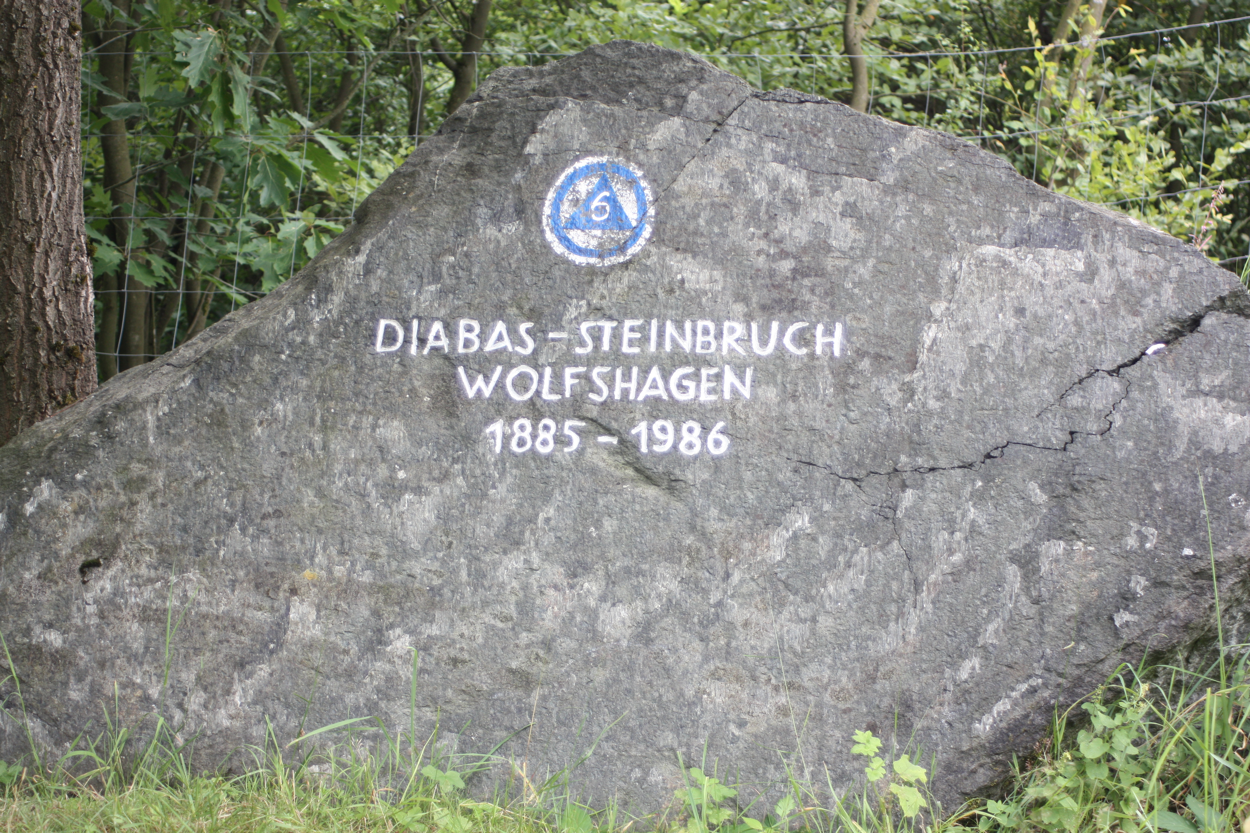 Diabas Steinbruch Wolfshagen 1885-1986